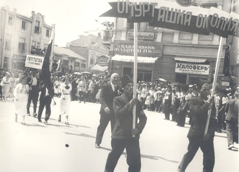 4-ти селскостопански културен и национален събор, 28 - 29 август 1938 г., гр. Варна. Парад на участниците в събора по ул. Княз Борис І. На преден план са представителите на Омурташка околия.